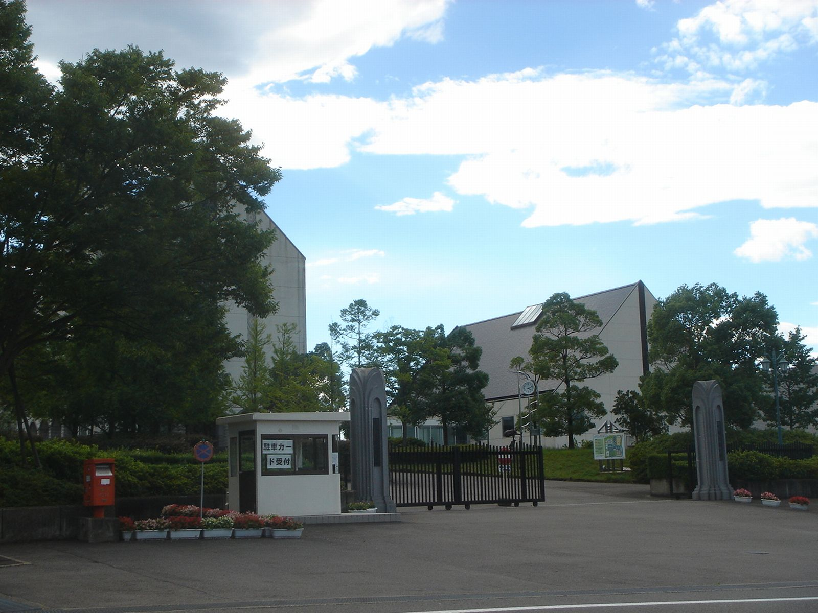 (中部学院大学,関キャンパス),Seki,Gifu,Japan(岐阜県関市桐ヶ丘)で撮影。